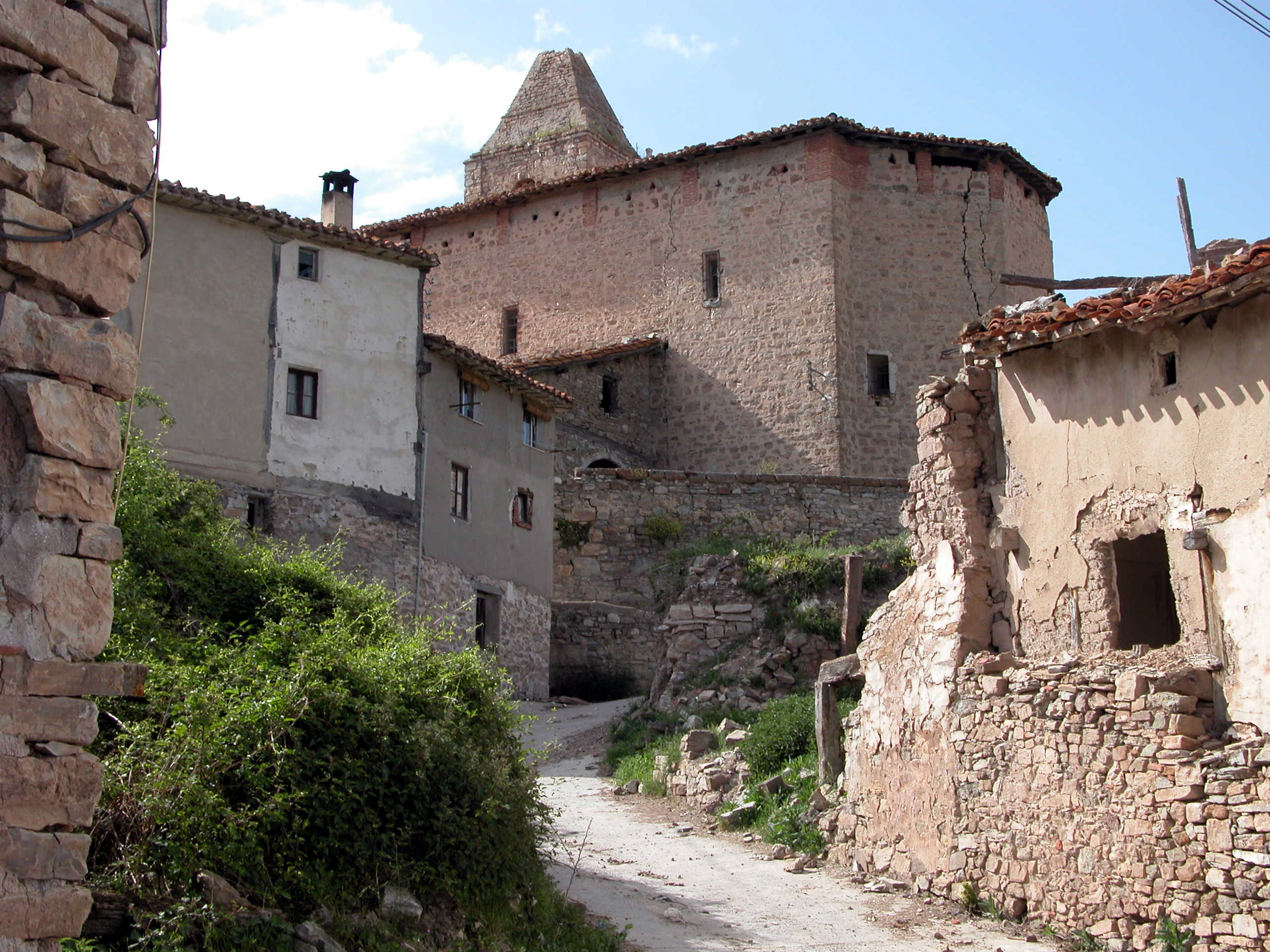 Torre en Cameros, municipio de La Rioja (España)